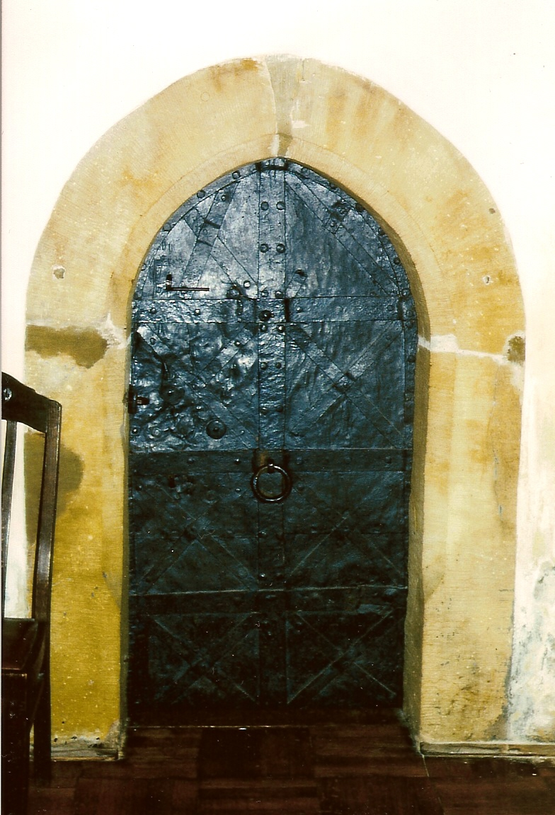 Gotisches Sakristeiportal der Kirche Fördergersdorf